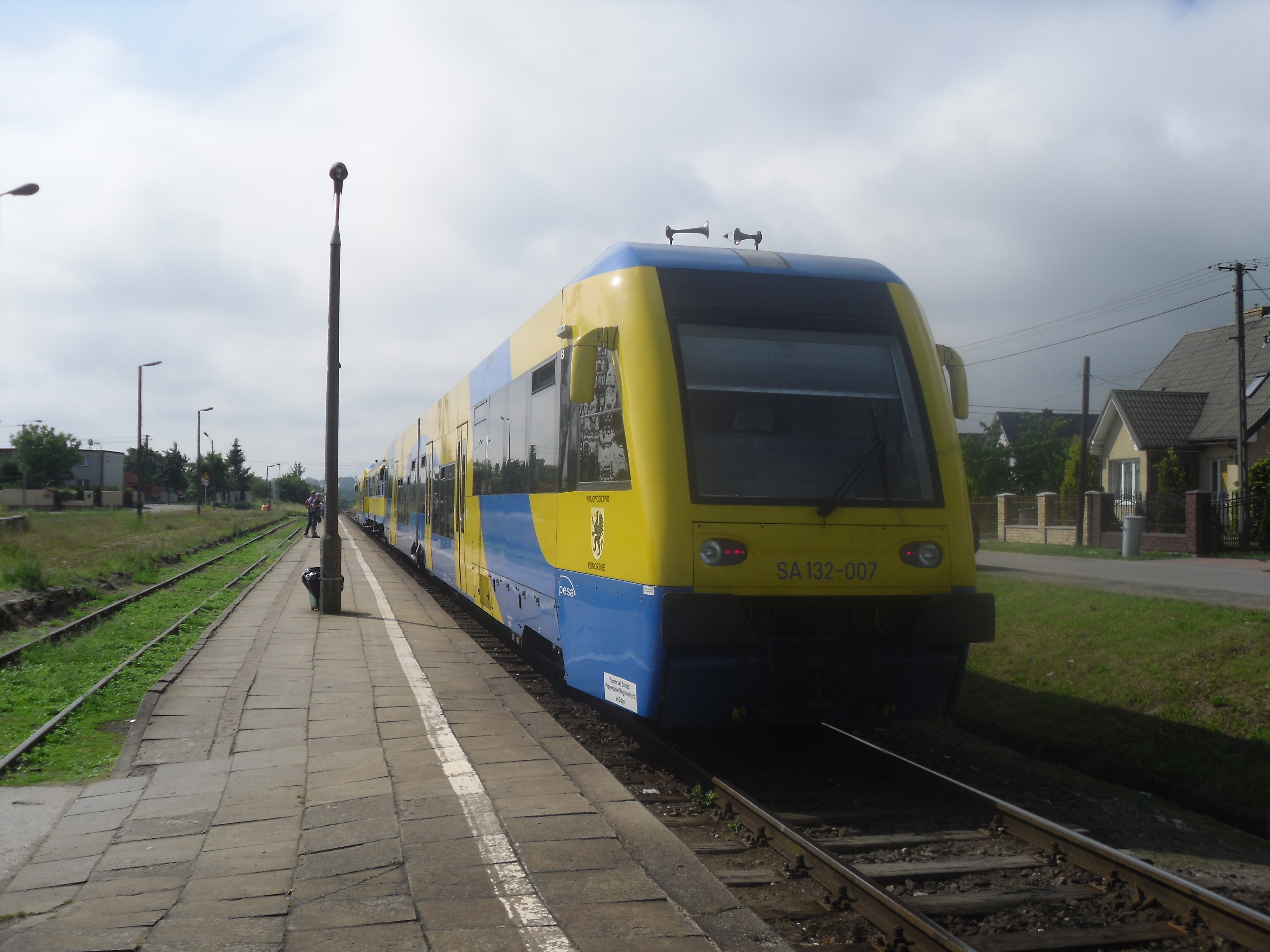 Pociąg SA132-007 do Gdyni odjeżdżający z Żelistrzewa.